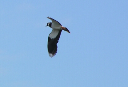 Vanellus vanellus en flying